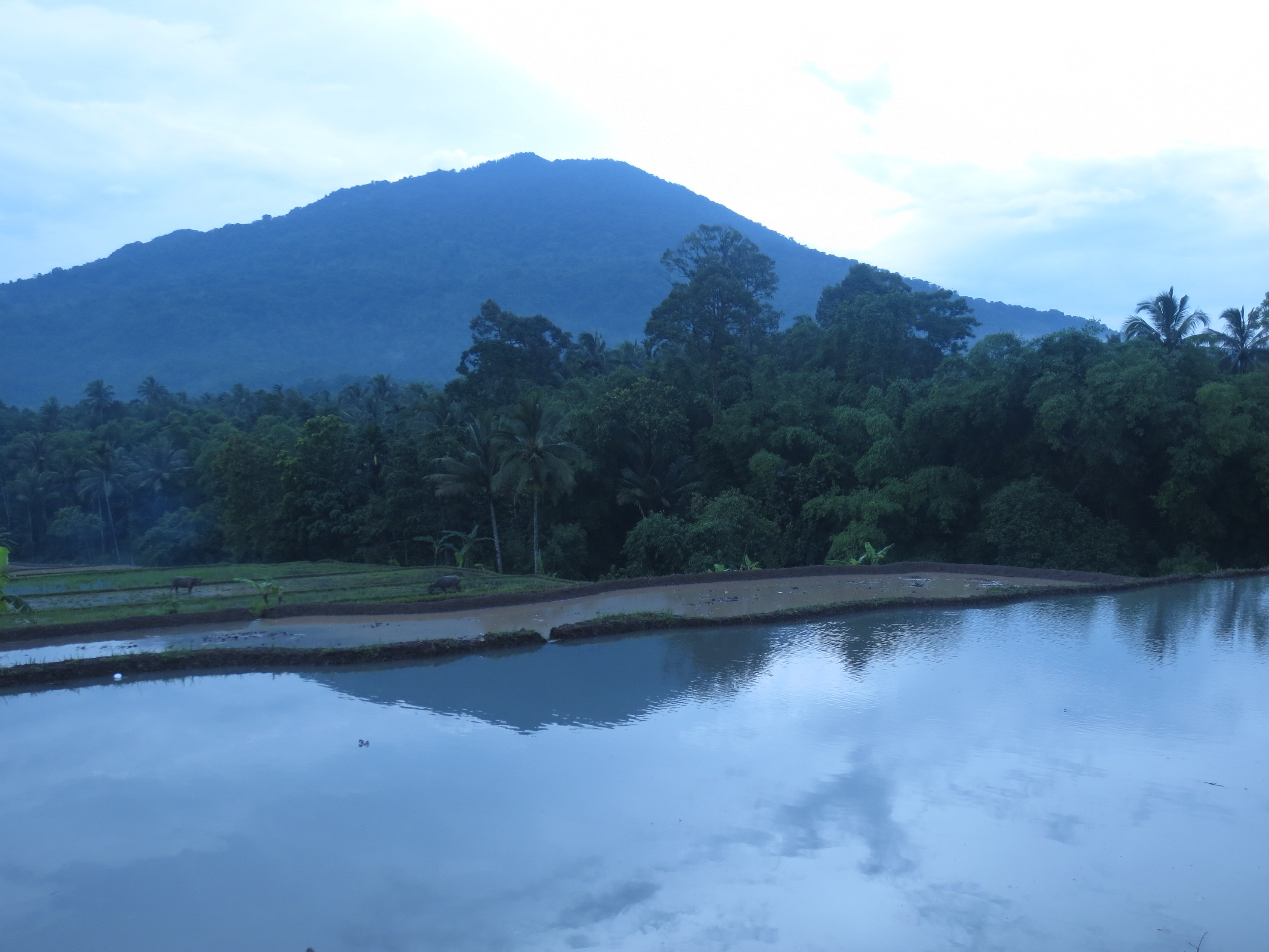 Kadubungbang, Cimanuk, Pandeglang Regency, Banten, Indonesia